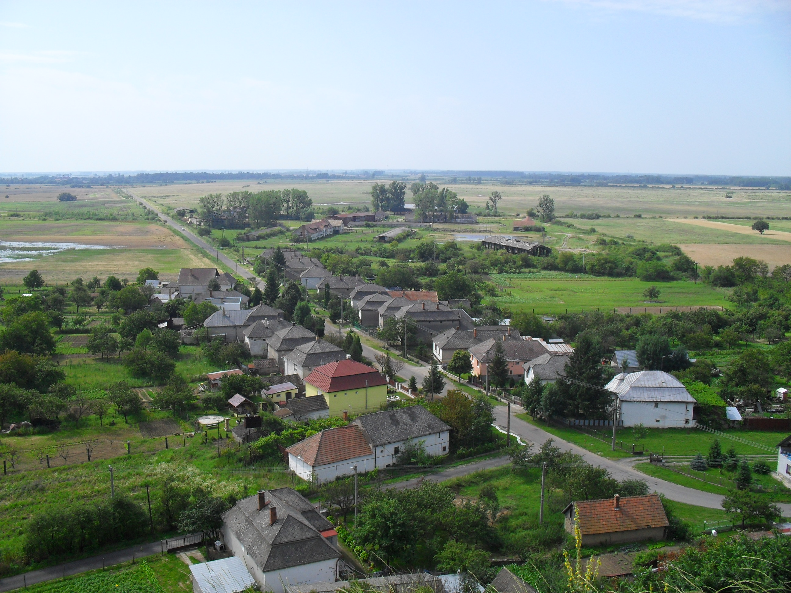 Nagykövesd - kilátás a várból délkelet felé (Európa utca)